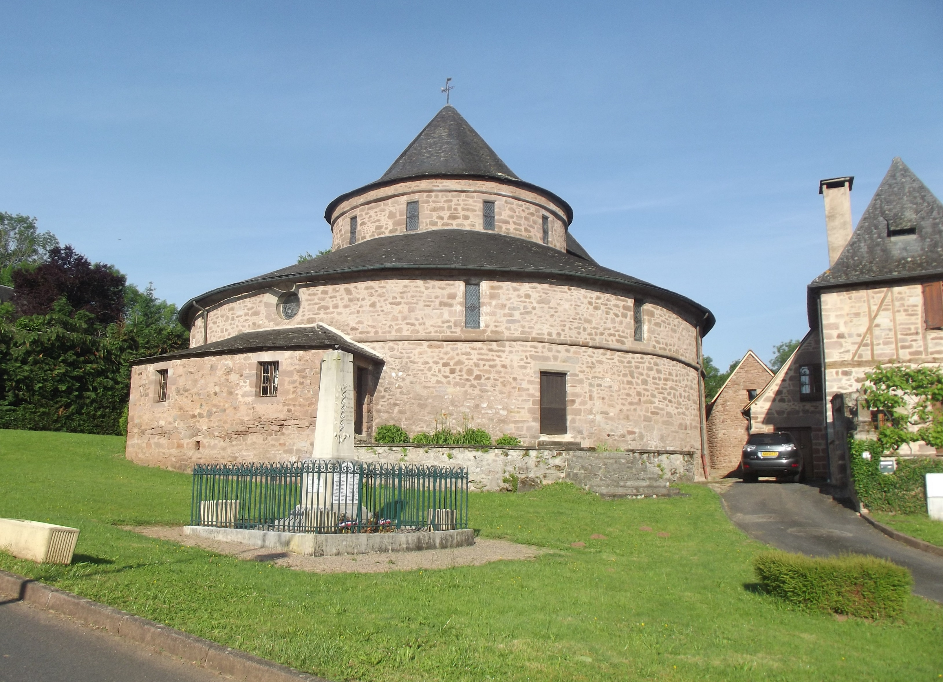 Église de Saint-Bonnet-la-Rivière